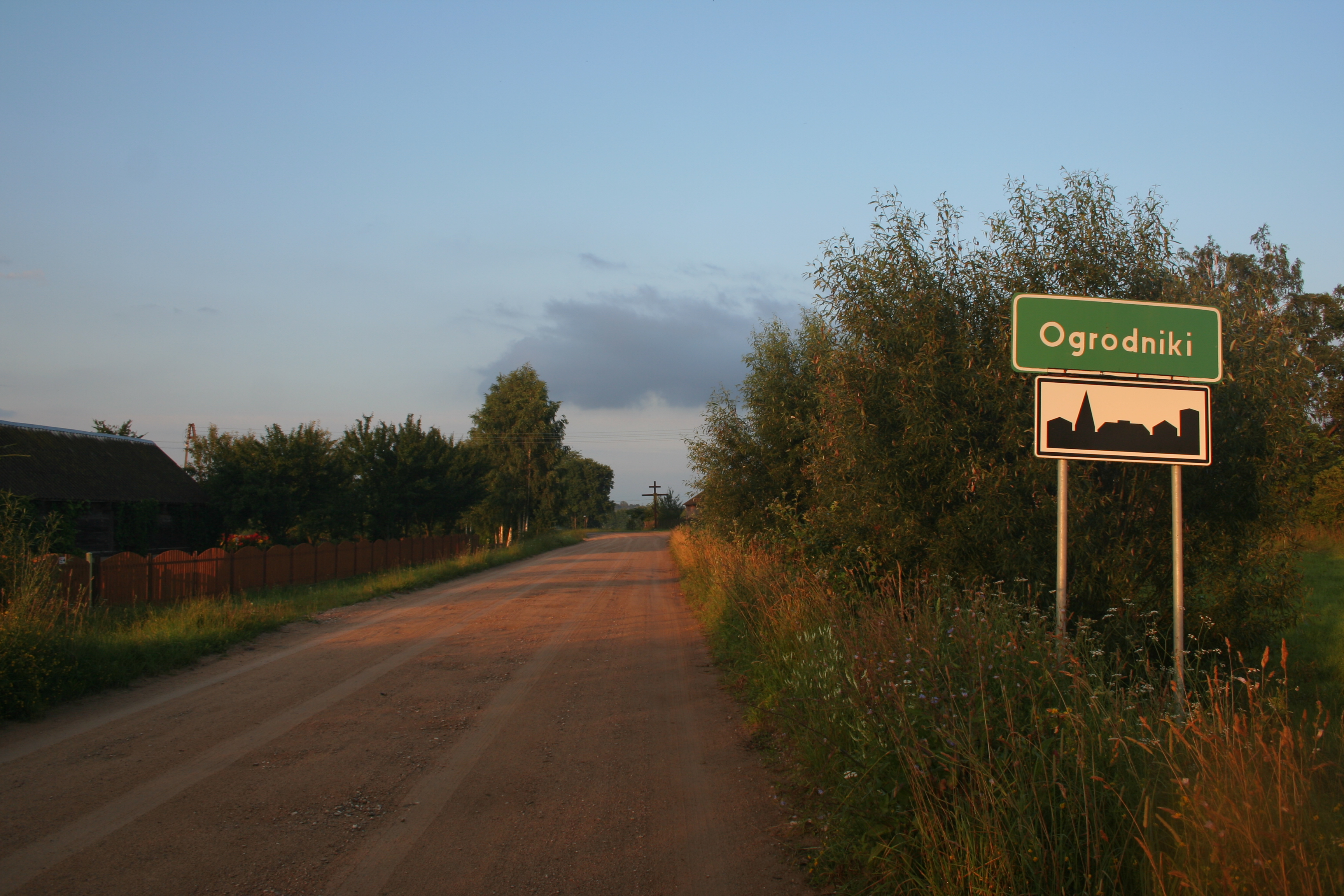 Droga wjazdowa do Ogrodników.